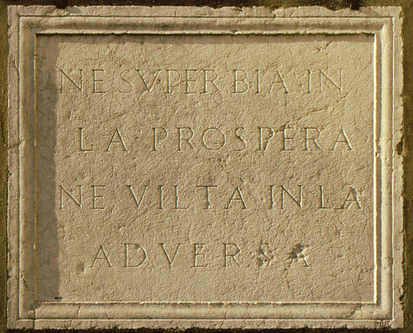 Castel Goffredo, epigrafe alysiana, posta sul fianco est della torre civica.